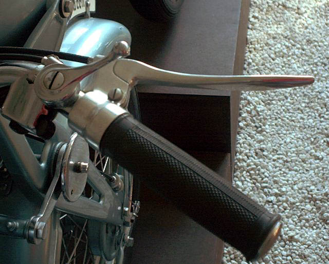 Gasdrehgriff und Bremshebel einer NSU OSL 251, Motorradmuseum Ibbenbüren